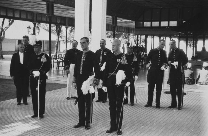 foto. Pakoe Alam VII, Gouverneur Bijleveld en een militair commandant tijdens het bezoek aan de Kraton van Sultan Hamengkoe Boewono VIII van Jogjakarta